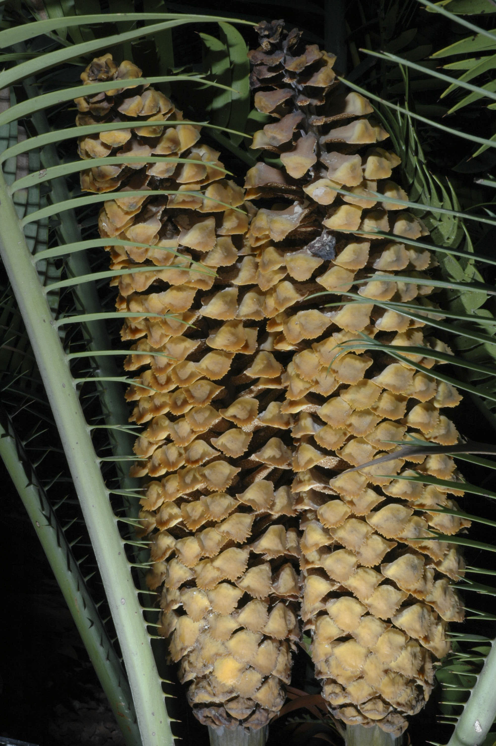 Cons d'Encephalartos senticosus al Jardí botànic de Barcelona.